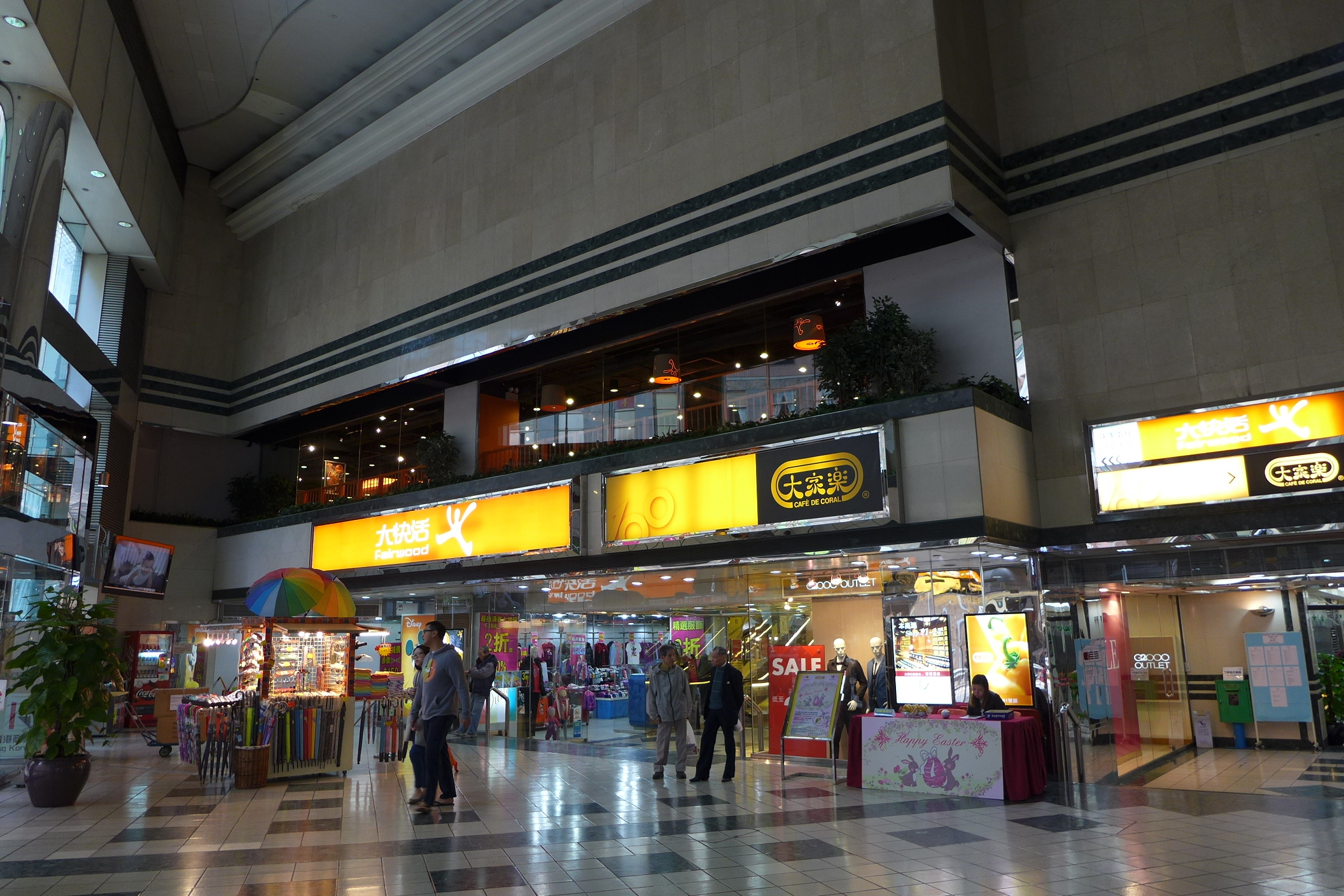 Hong Kong Plaza Entrance Void